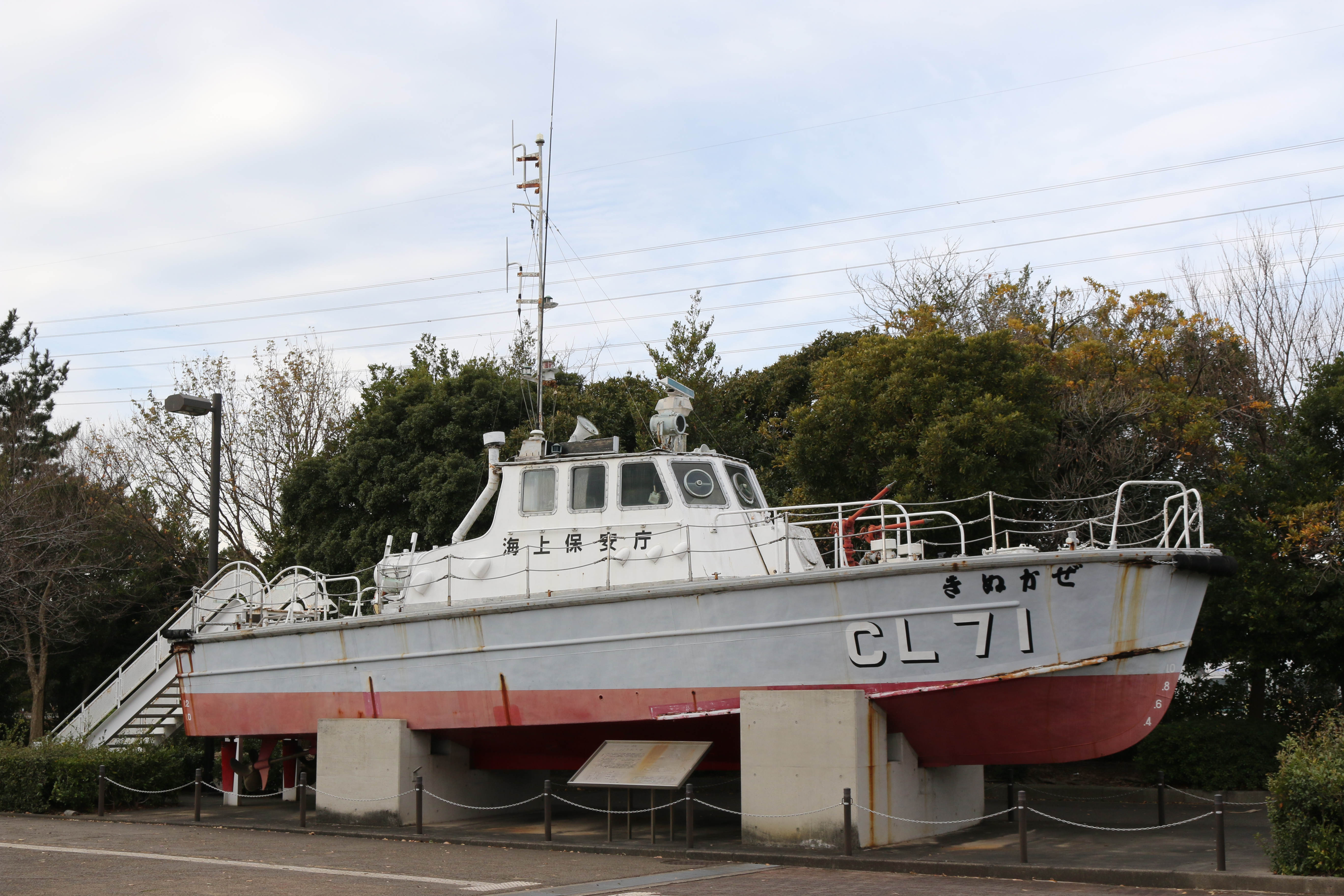 碧南市青少年海の科学館で保存展示されている、CL71 きぬかぜ